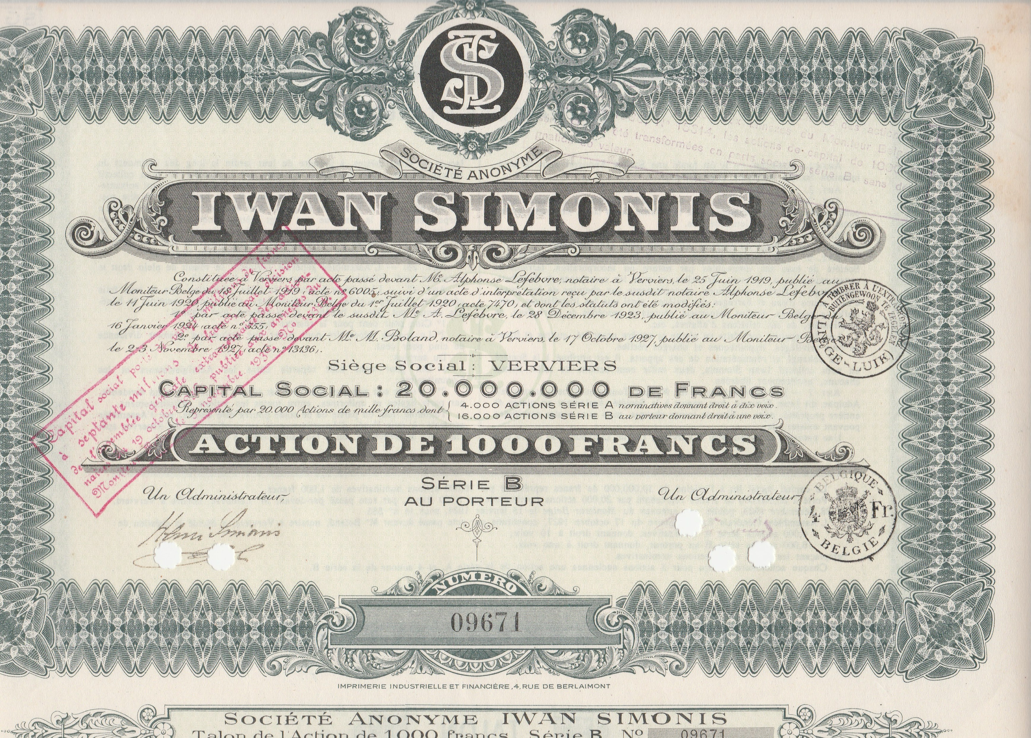 Eine Iwan.Simonis-Aktie (etwas angeschnitten) aus dem Jahre 1949 (?), mit einem Schriftzug des Henri Simonis (li.)